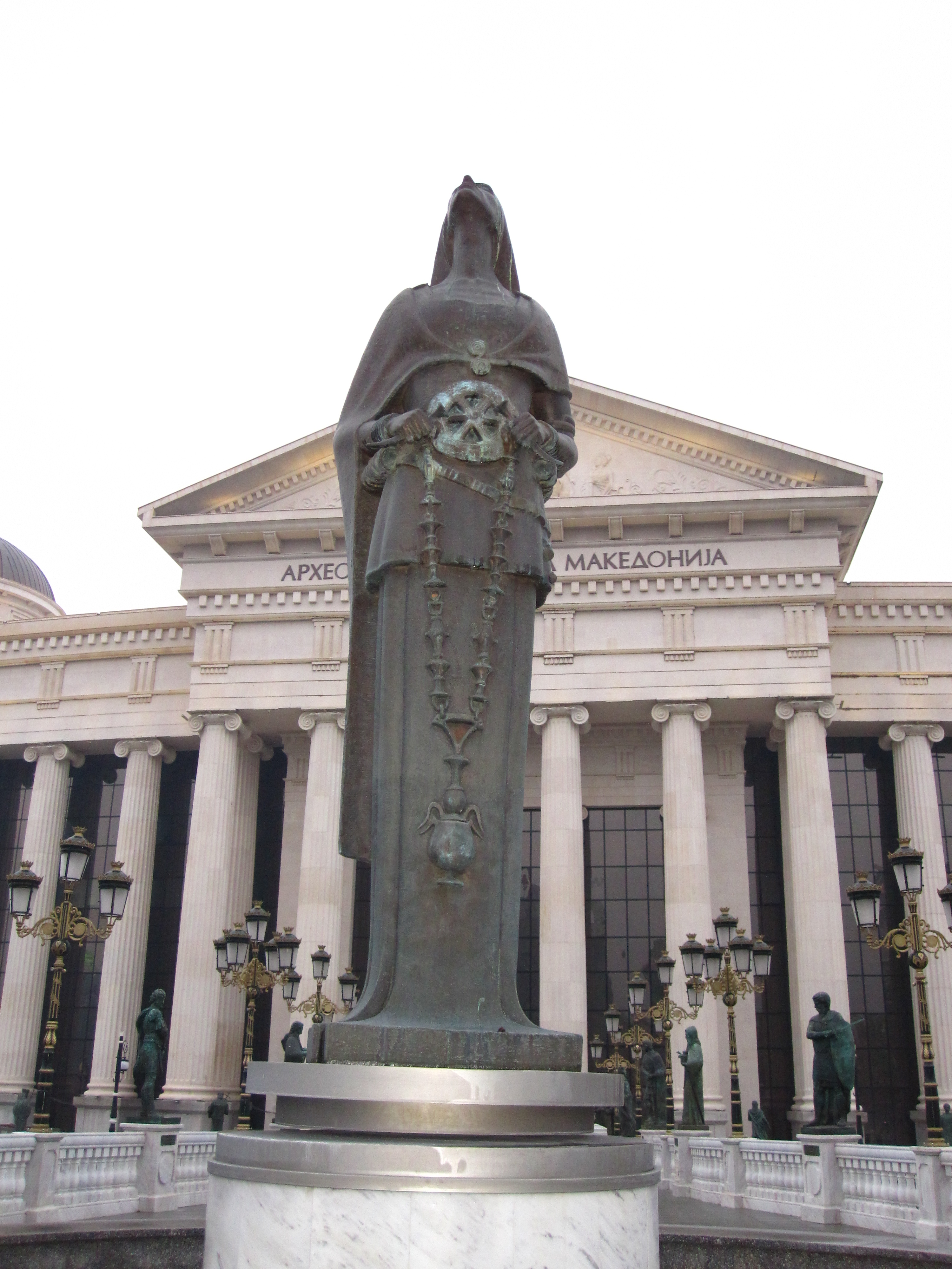 Пајонската свештеничка е бронзена скулптура посветена на пајонска свештеничка, пронајдена на некрополата Лисичин Дол на валандовскиот археолошки локалитет Исар-Марвинци.